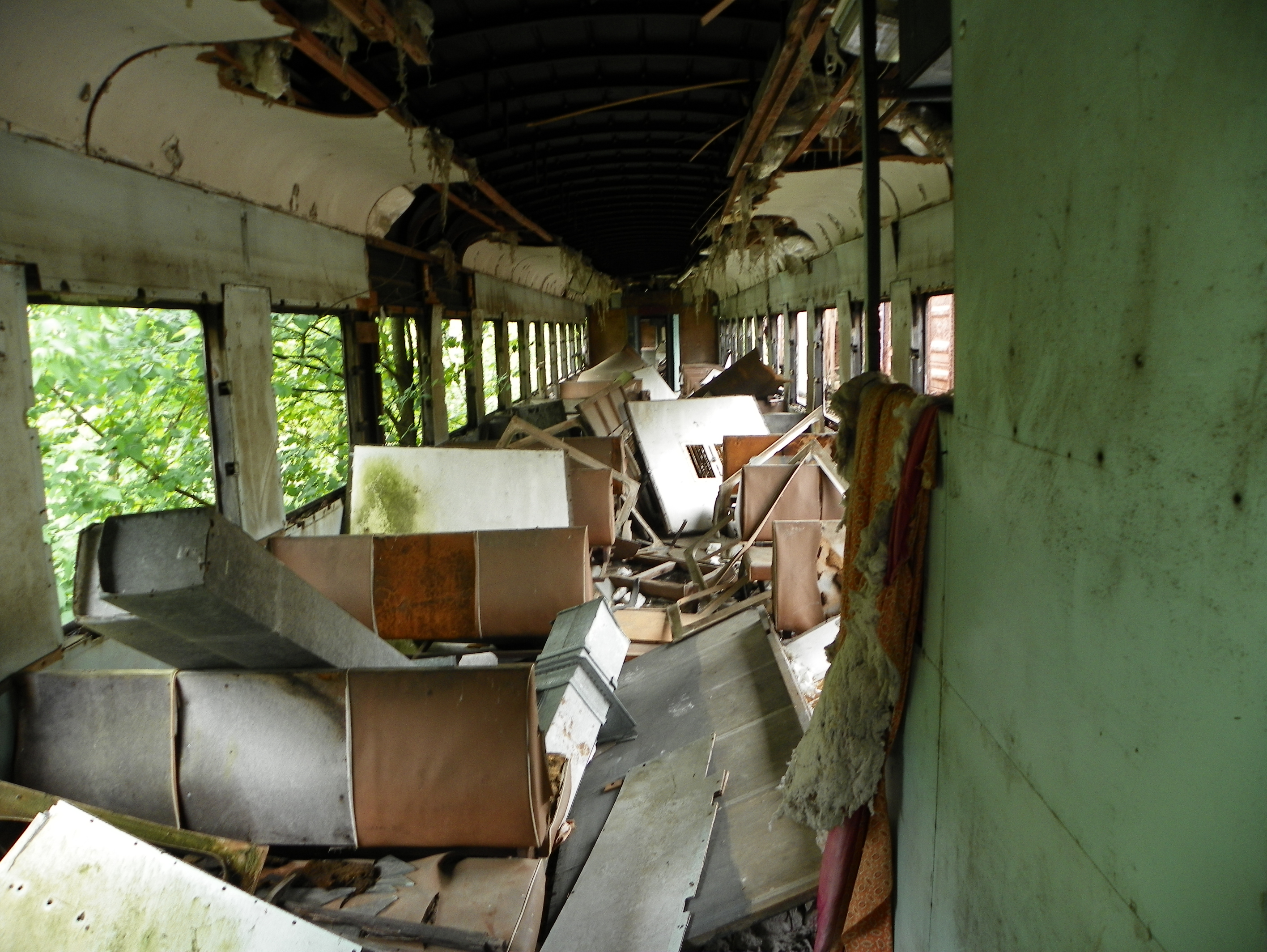 Залізнична станція "Янів" у Чорнобильській зоні